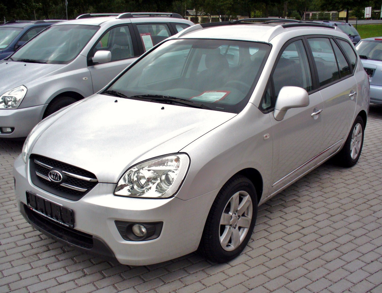 Kia Carens